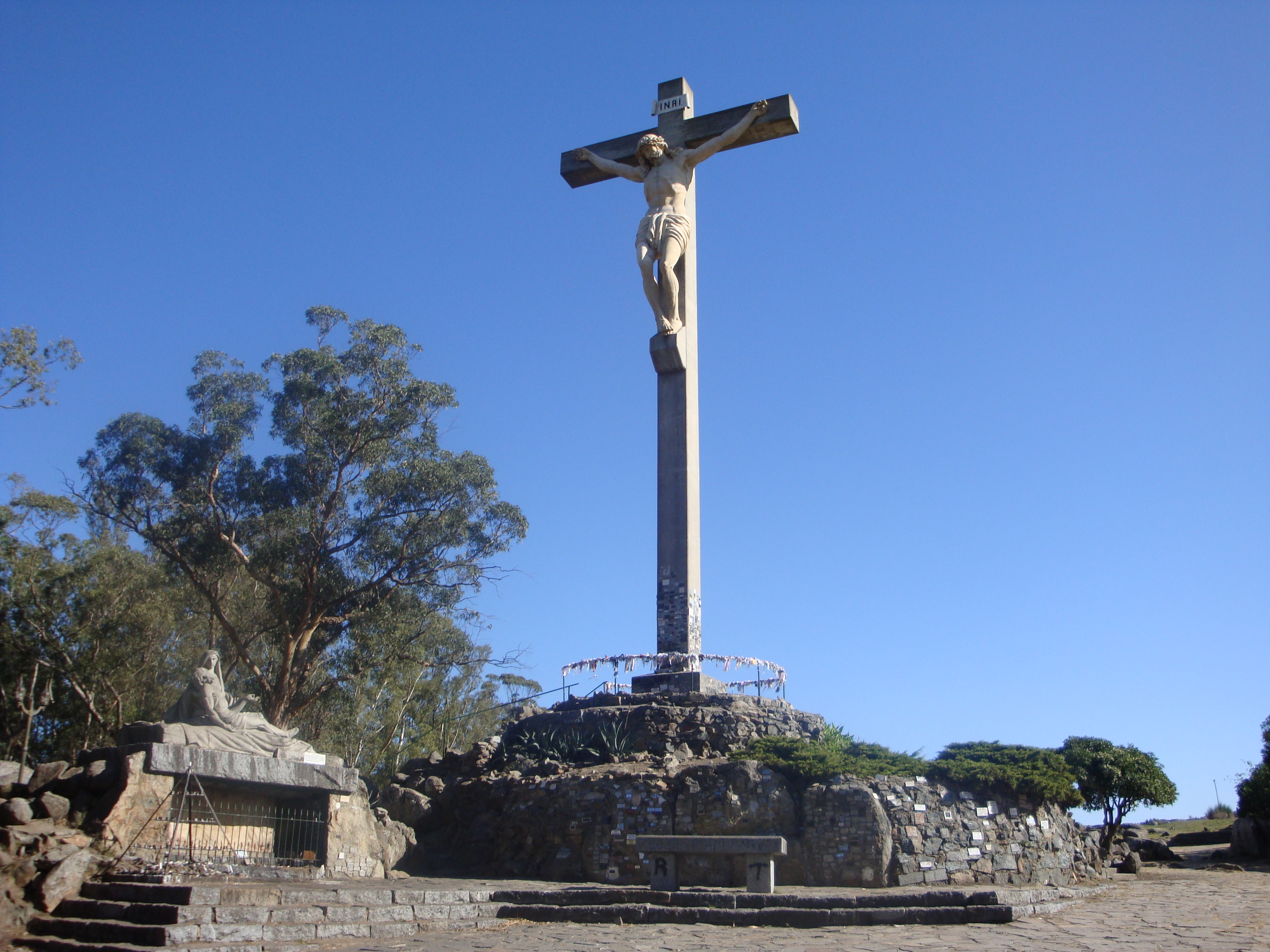 Cristo en la Cruz, El Calvario, Tandil